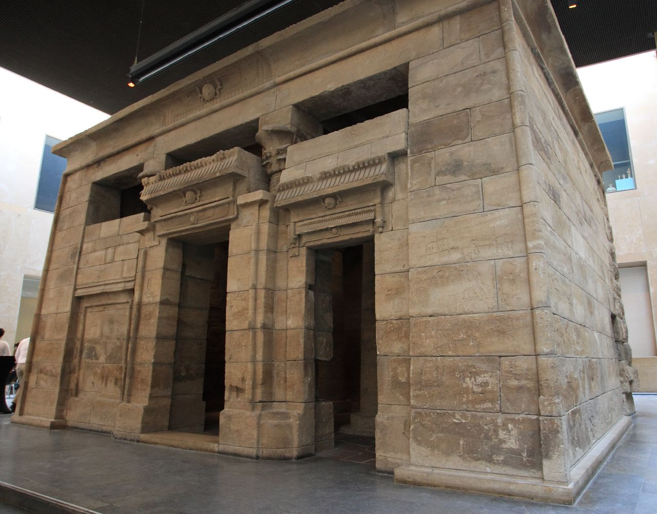 Venster 2 (De wapens van Jan van Valkenburg en zijn echtgenoot Johanna van Voorne, vrouwe van Bergen op Zoom.)Egyptian temple. In het kader van Wiki Loves Art NL.